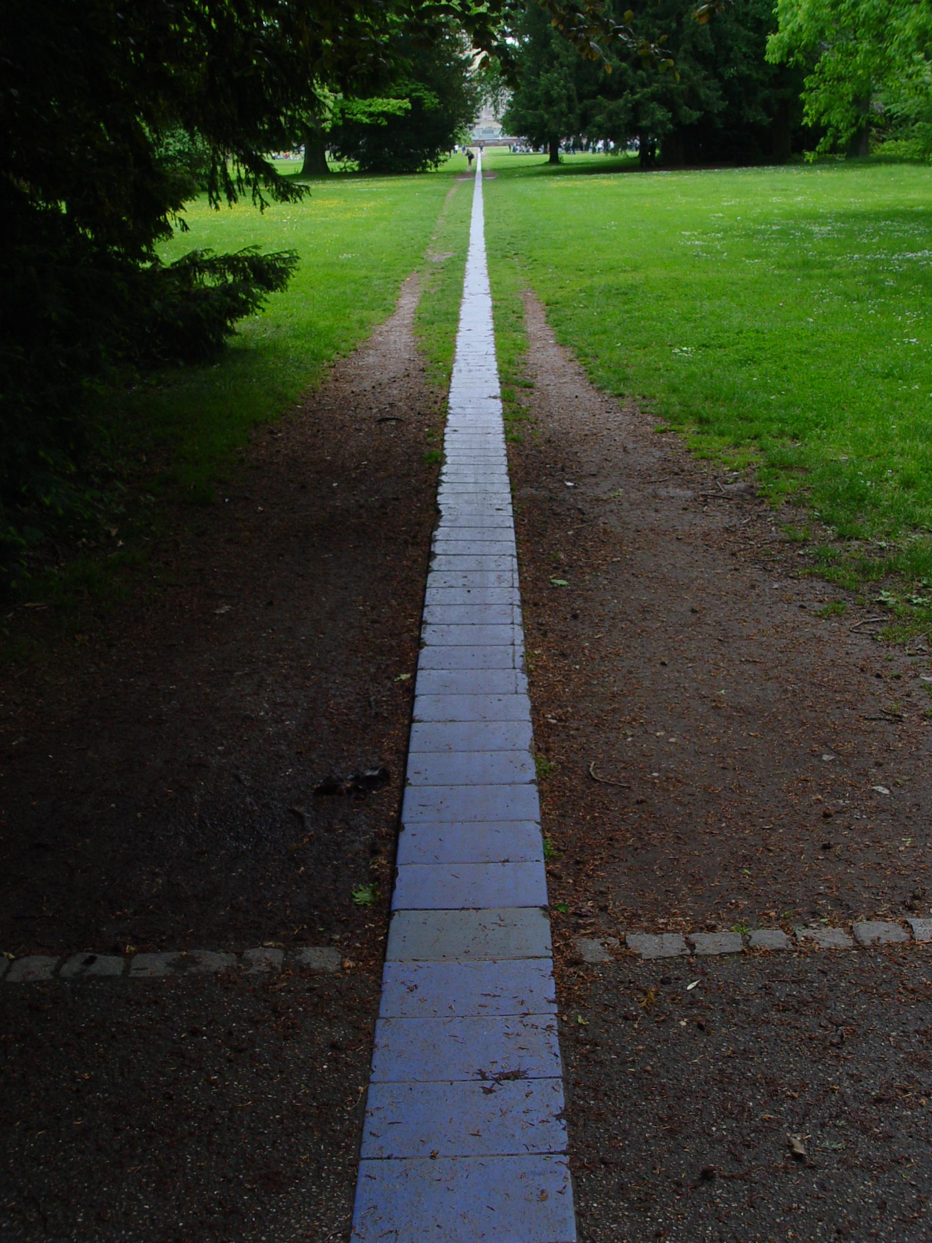 Blaues Band Karlsruhe